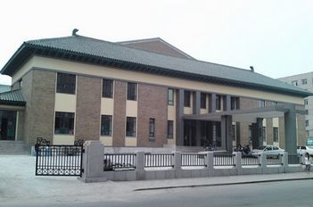 Hsinking Public Hall（新京公会堂）